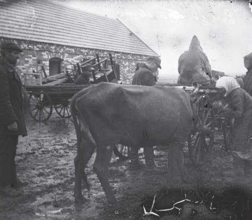 1930-е. Раскулачивание крестьянина П. Емца в Гришинском районе Донецкой области